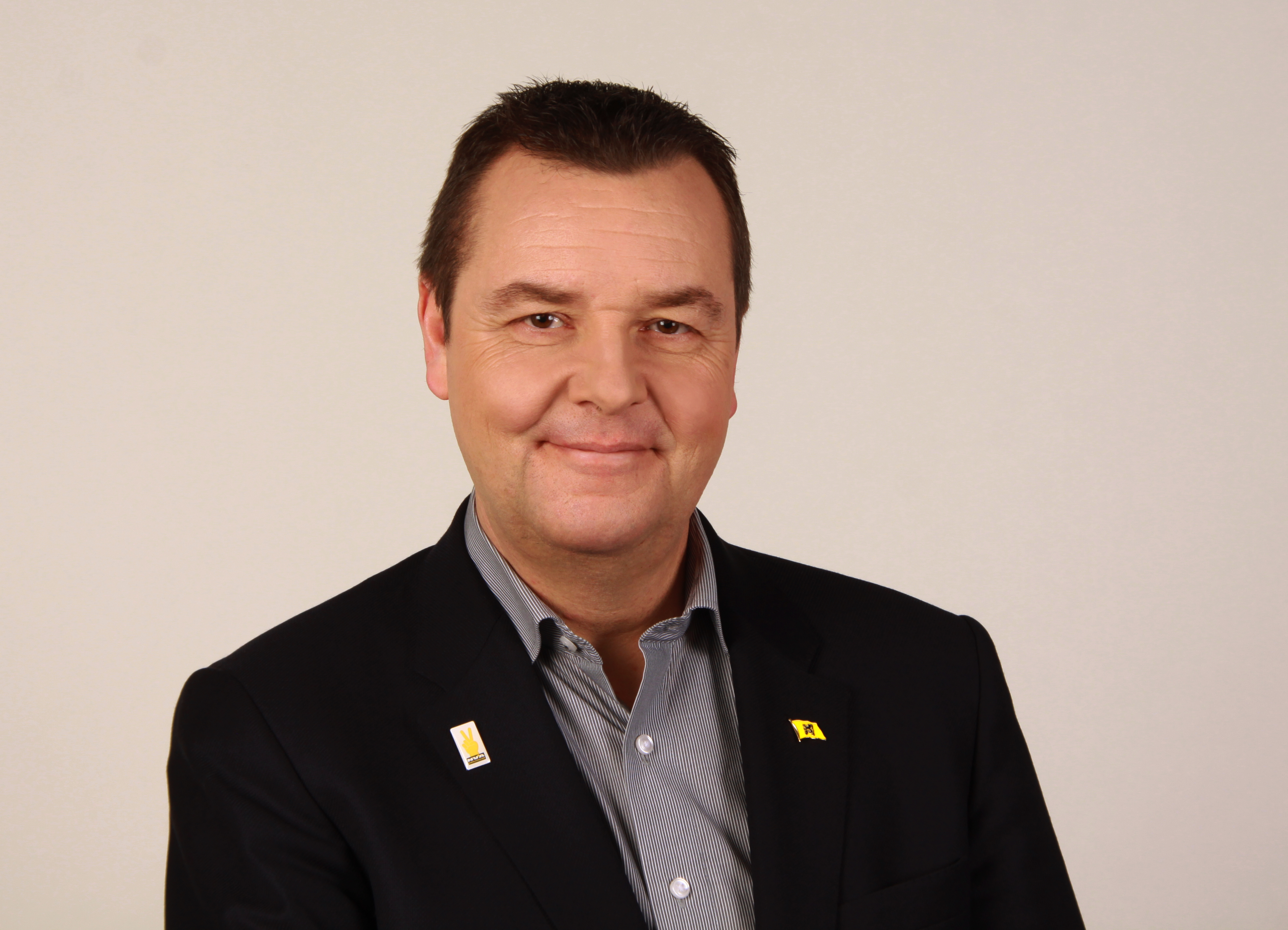 Abgeordnete/r Europaparlament